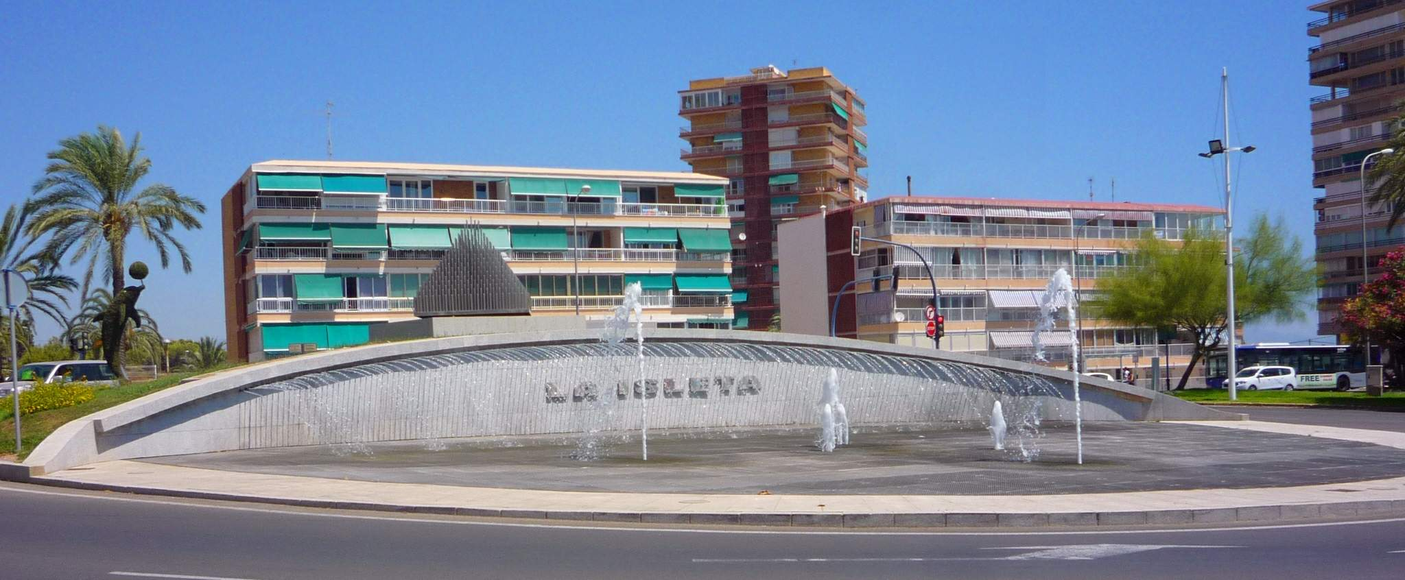 Rotonda de La Isleta (Alicante)